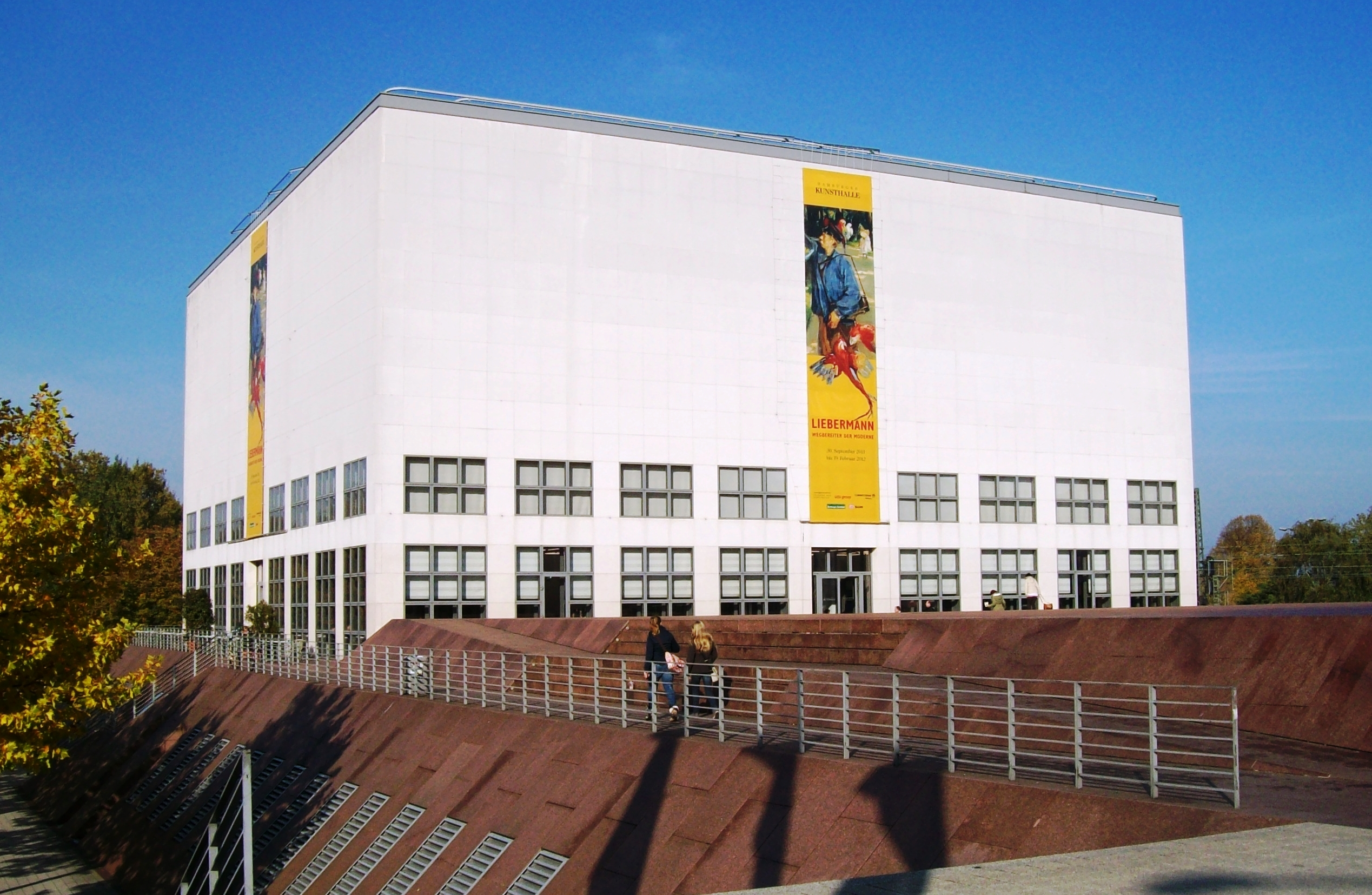 Altstadt, Hamburg, Germany